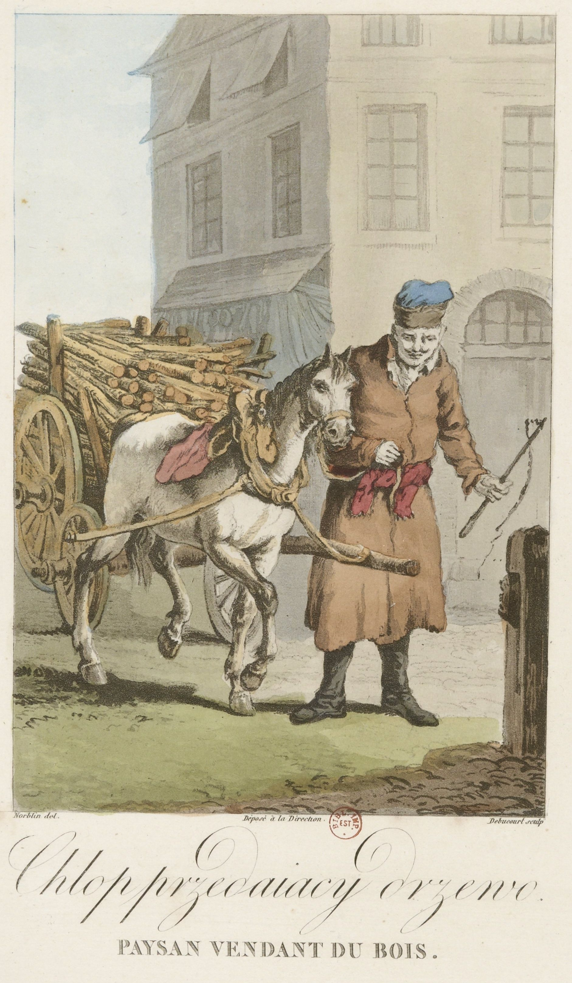 Крестьянин, торгующий древесиной